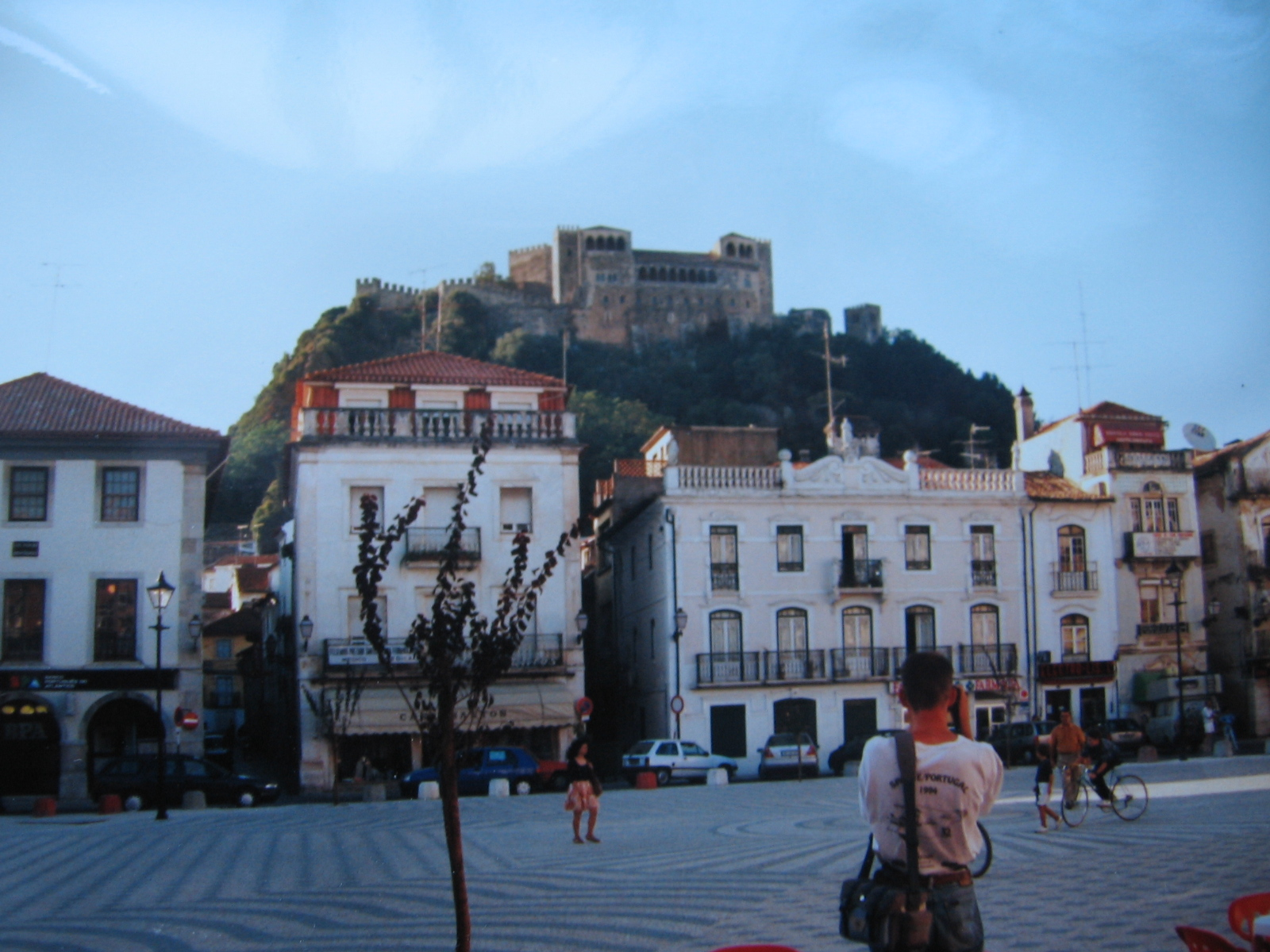 oude foto's van vroegere vakanties